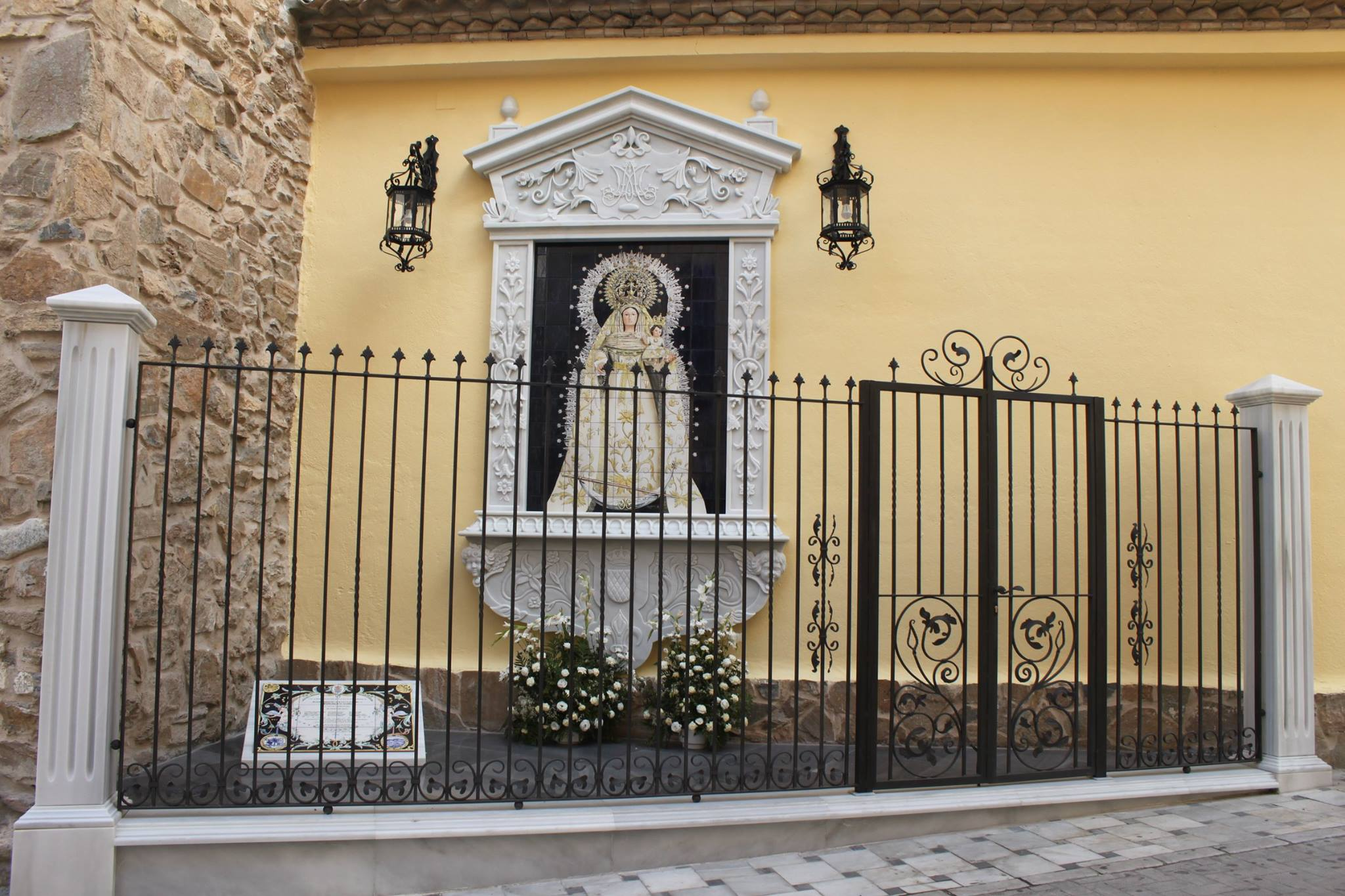 Monumento a la Virgen del Rosario, Patrona de Macael, nombrada el día 5 de Julio de 2014 Alcaldesa Perpétua y Honorífica de esta Villa.